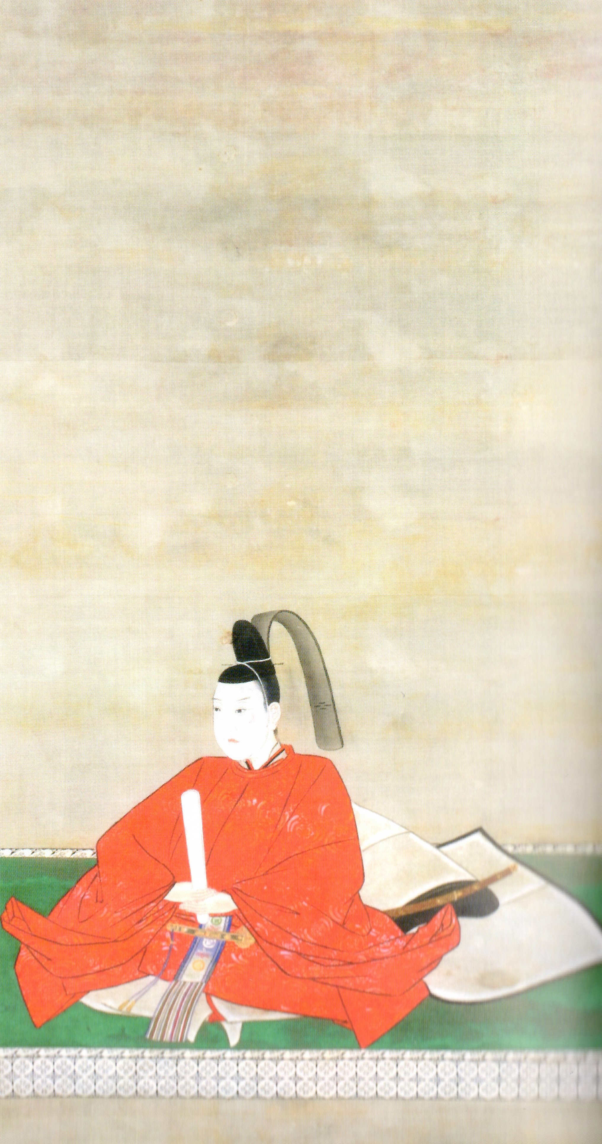 阿部正教の肖像。